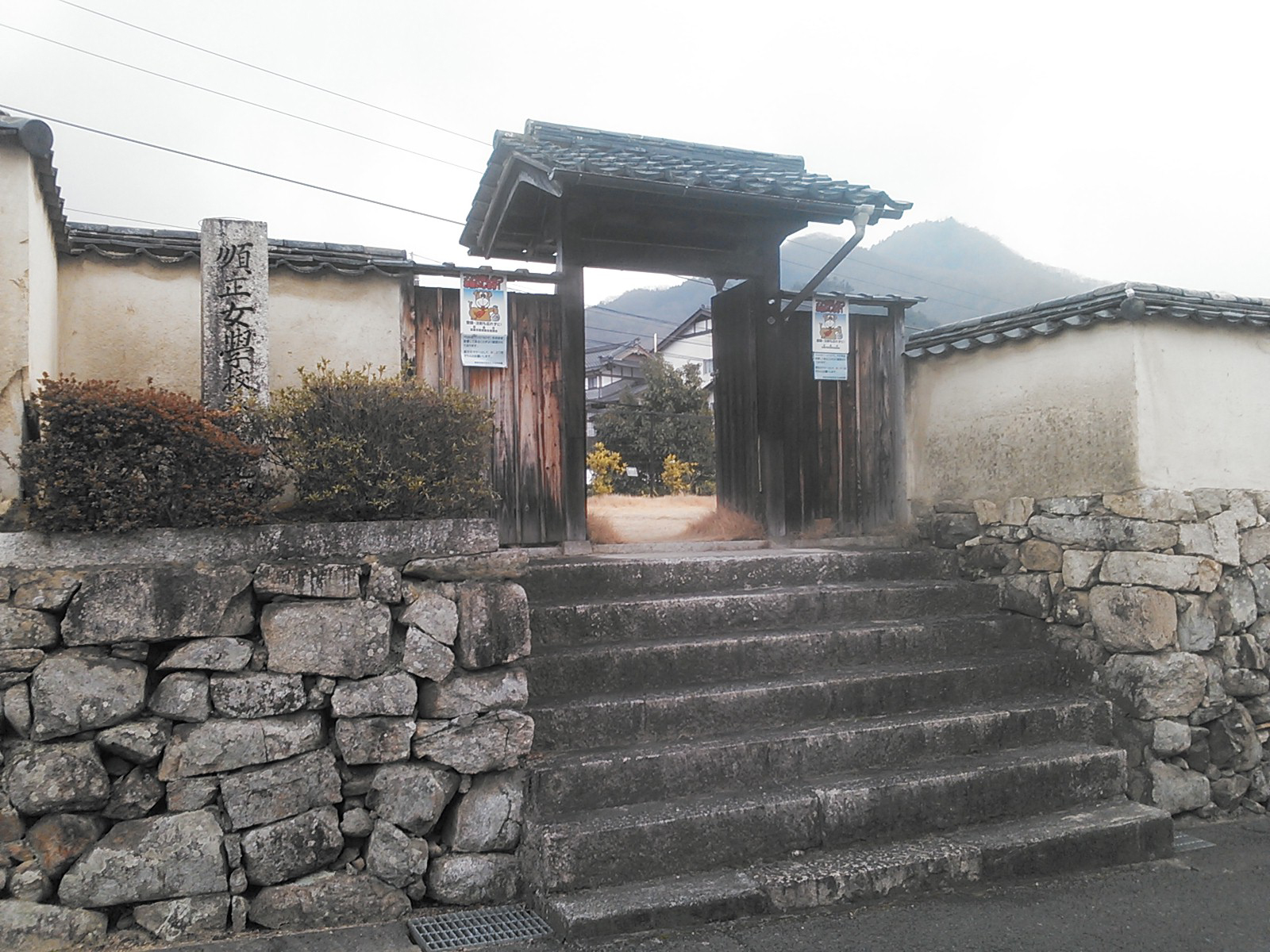 福西志計子公園（順正女学校開設地。旧黒野邸）の門。投稿者本人による撮影。なお順正女学校そのものは明治29年に本拠を頼久寺町（現・順正寮）明治41年に伊賀町（現・順正学園総本部の位置）へと移す事になる。